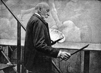 French painter Pierre Puvis de Chavannes (1824-1898) working on the decoration of the Paris Hôtel de ville. Pierre Puvis de Chavannes exécutant la décoration de l'hôtel de ville de Paris.